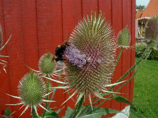 Juli: Humlebi og svirreflue på Kartebolle.